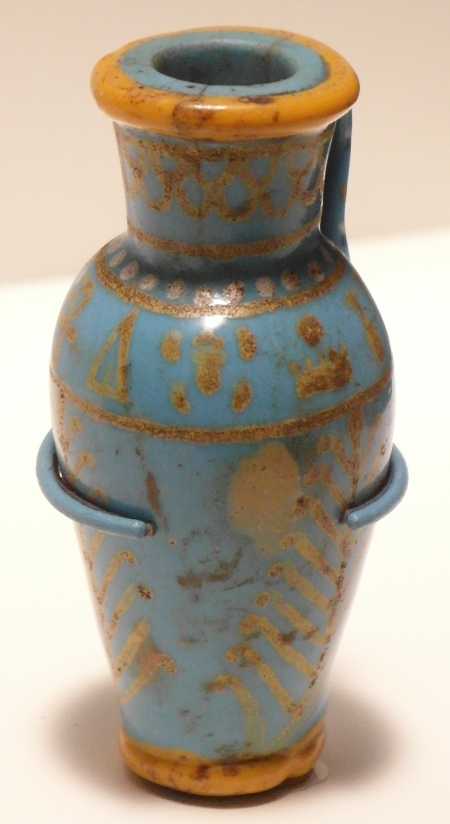 Jarra de vidrio turquesa para cosméticos. Es el recipiento de vidrio esmaltado más antiguo que se conserva. Está decorado con el nombre del faraón Tutmosis III. Dinastía XVIII, reinado de Tutmosis III (hacia 1479-1425 a. C.). Tebas. EA 47620.